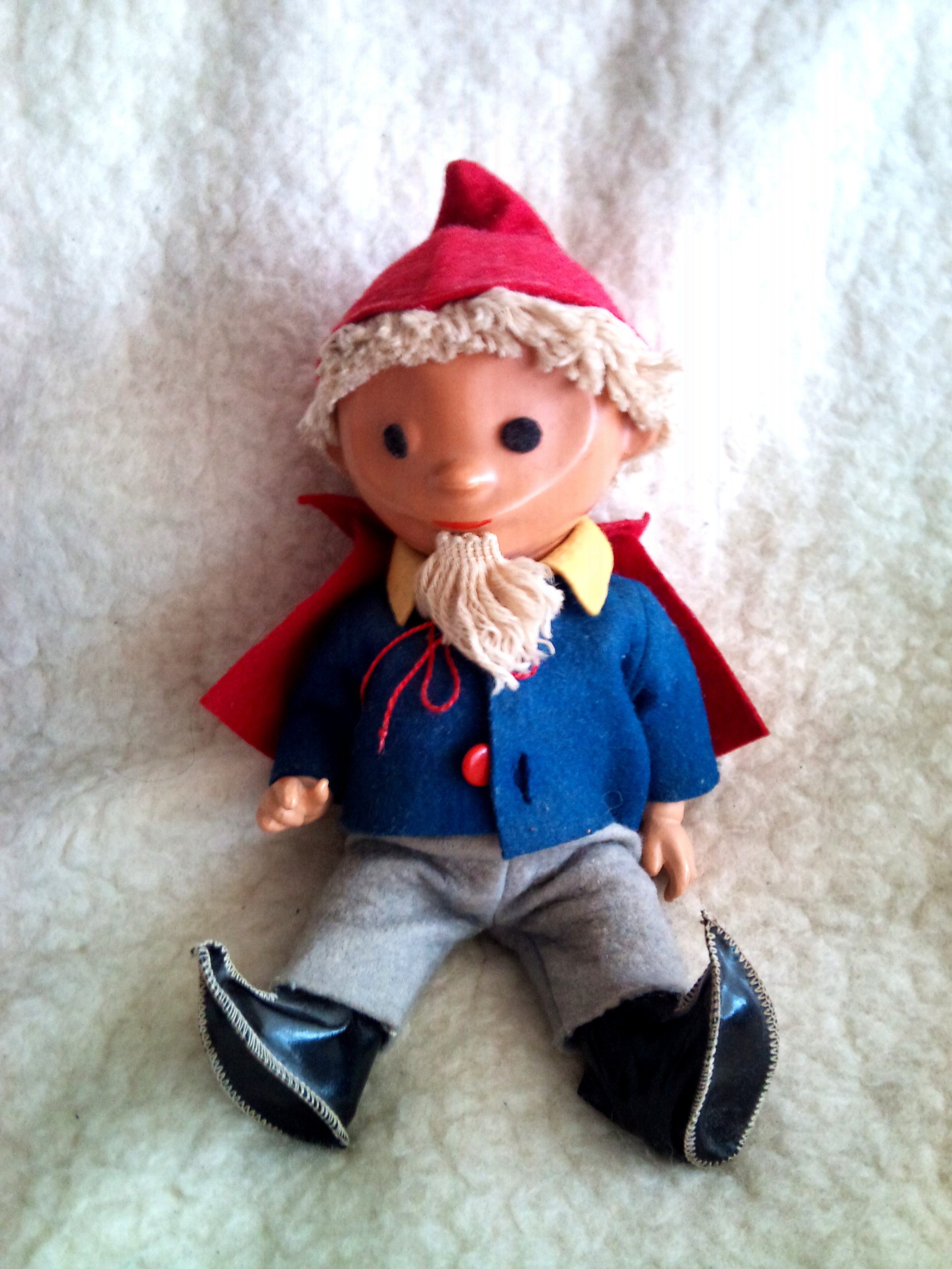 Alte Sandmann Spielzeugpuppe (vermutlich aus den späten 60ern oder frühen 70ern)